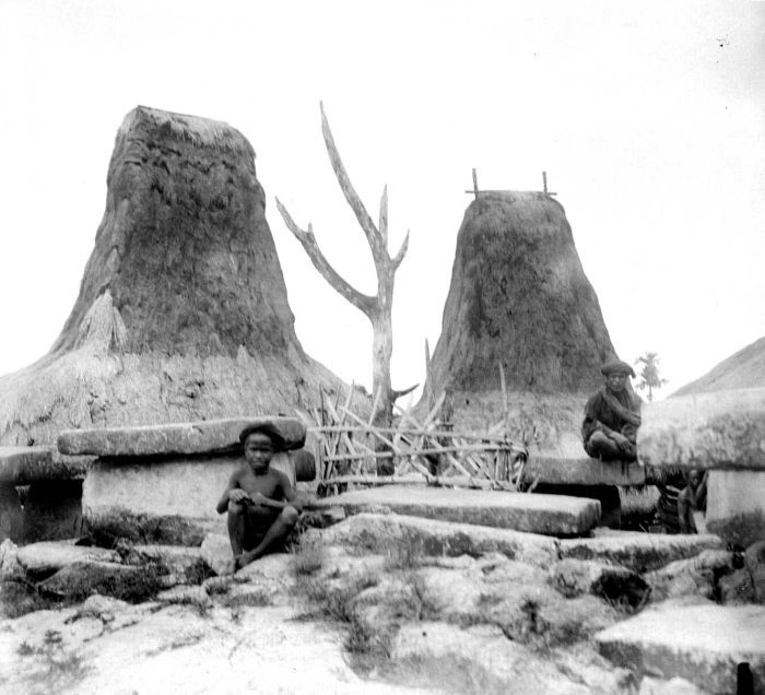 Negatief. Een dodenboom (andong) in kampong Taroeng, West-Sumba